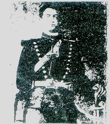 Lorenzo Cavallo, in una foto d'epoca risalente al 1868, in alta uniforme del VII Reggimento Artiglieria.